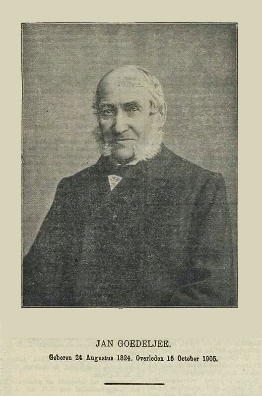 Portret van Jan Goedeljee in het Leidsch Dagblad van 17 oktober 1905. Tekst: Jan Goedeljee. Geboren 24 augustus 1824, overleden 15 oktober 1905.